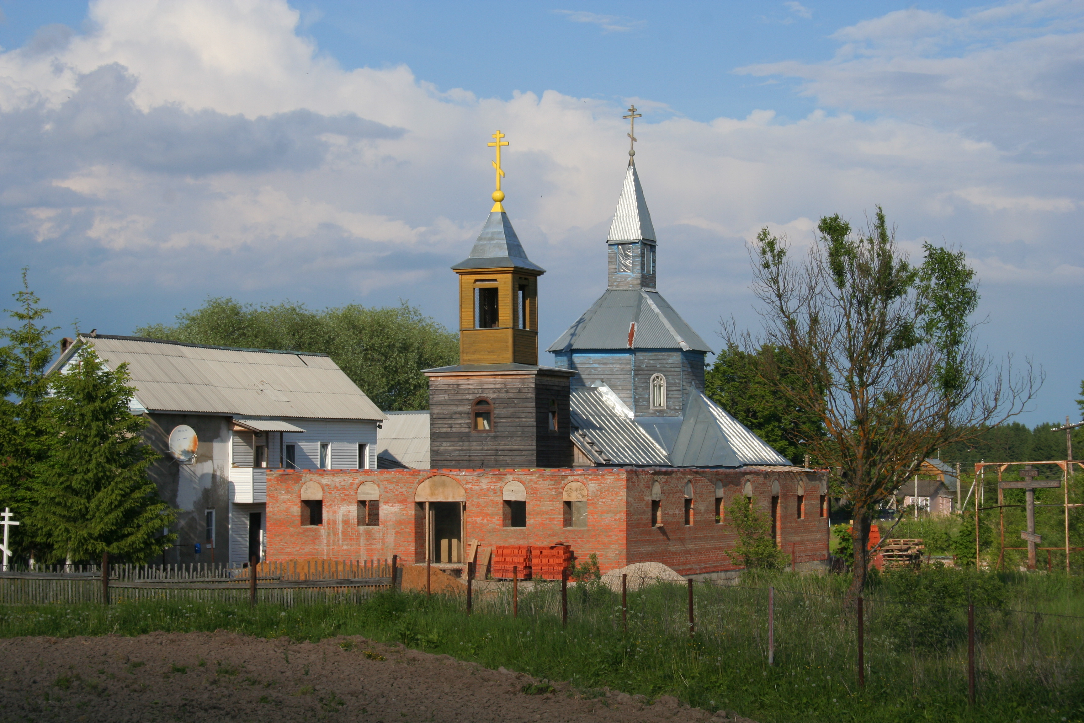 Siedlung Mjatlewo, Oblast Kaluga, Russland. Kirche.